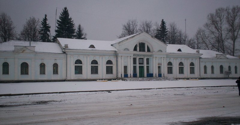 Gus-Chrustalny Гусь-Хрустальный.